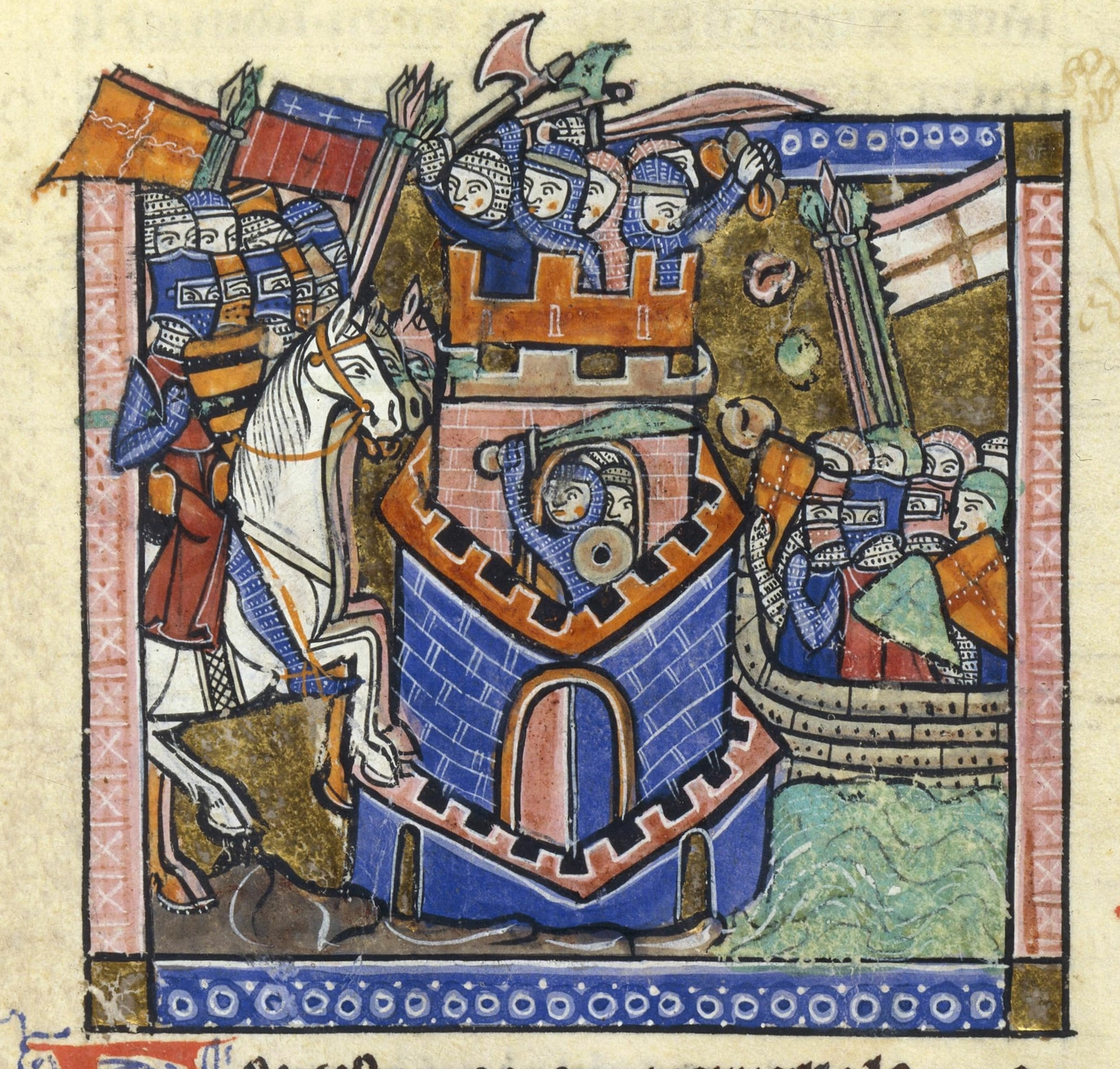 Siège de Tyr (1124)